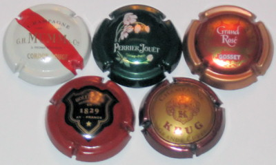 5 Champagne Capsules